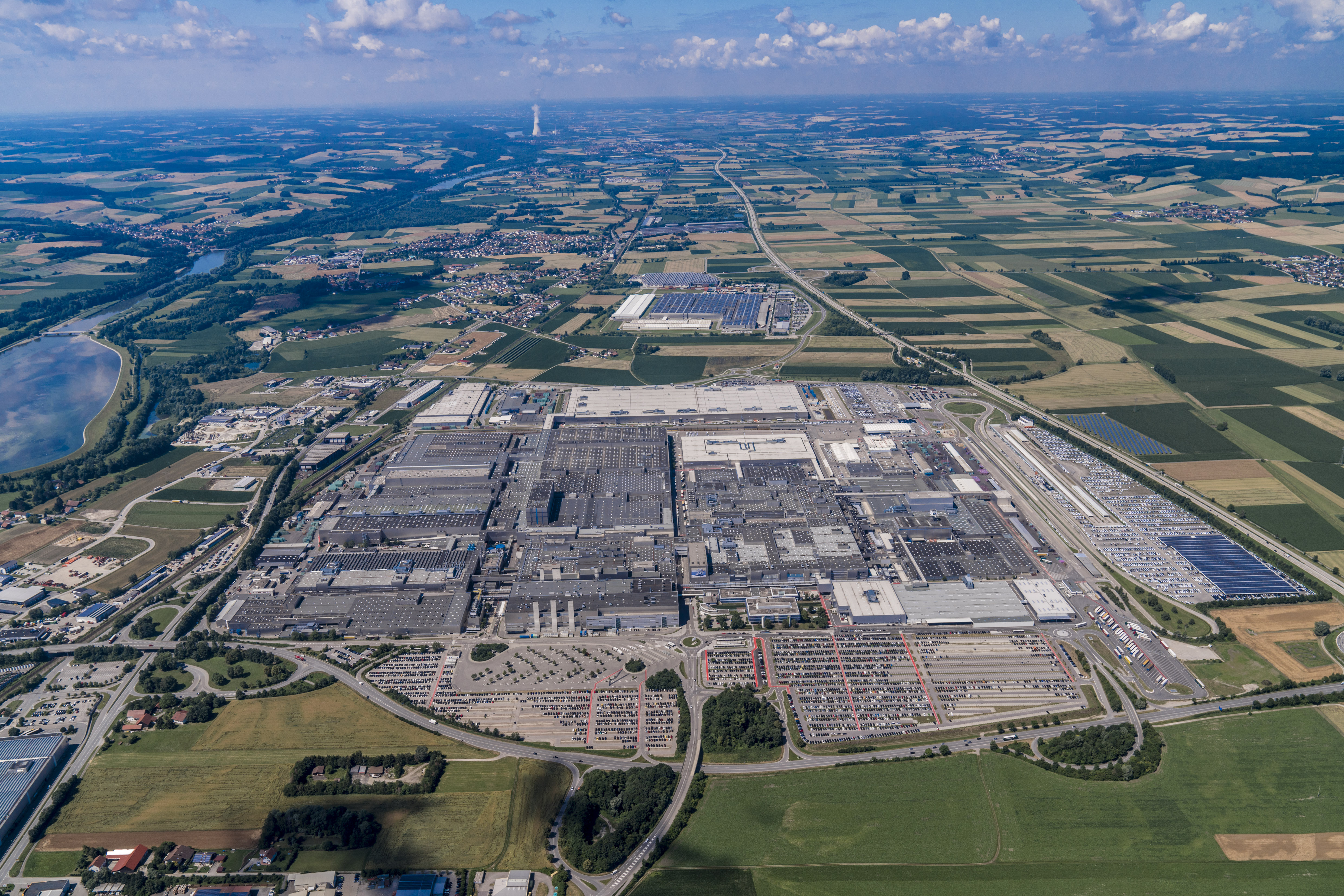 Das BMW Group Werk 02.40 stellt am Tag 1.600 Fahrzeuge her.